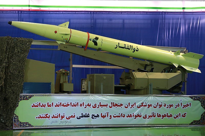 افتتاح خط تولید موشک ذوالفقار نخستین موشک سوخت جامد نقطه زن با برد ۷۰۰ کیلومتر